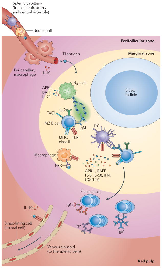 Figura 2. T cell-independent responses by human MZ B cells. Bazo humano. Pulpa Blanca. Zona Marginal. Pulpa Roja. Arteriola central. Seno venoso.